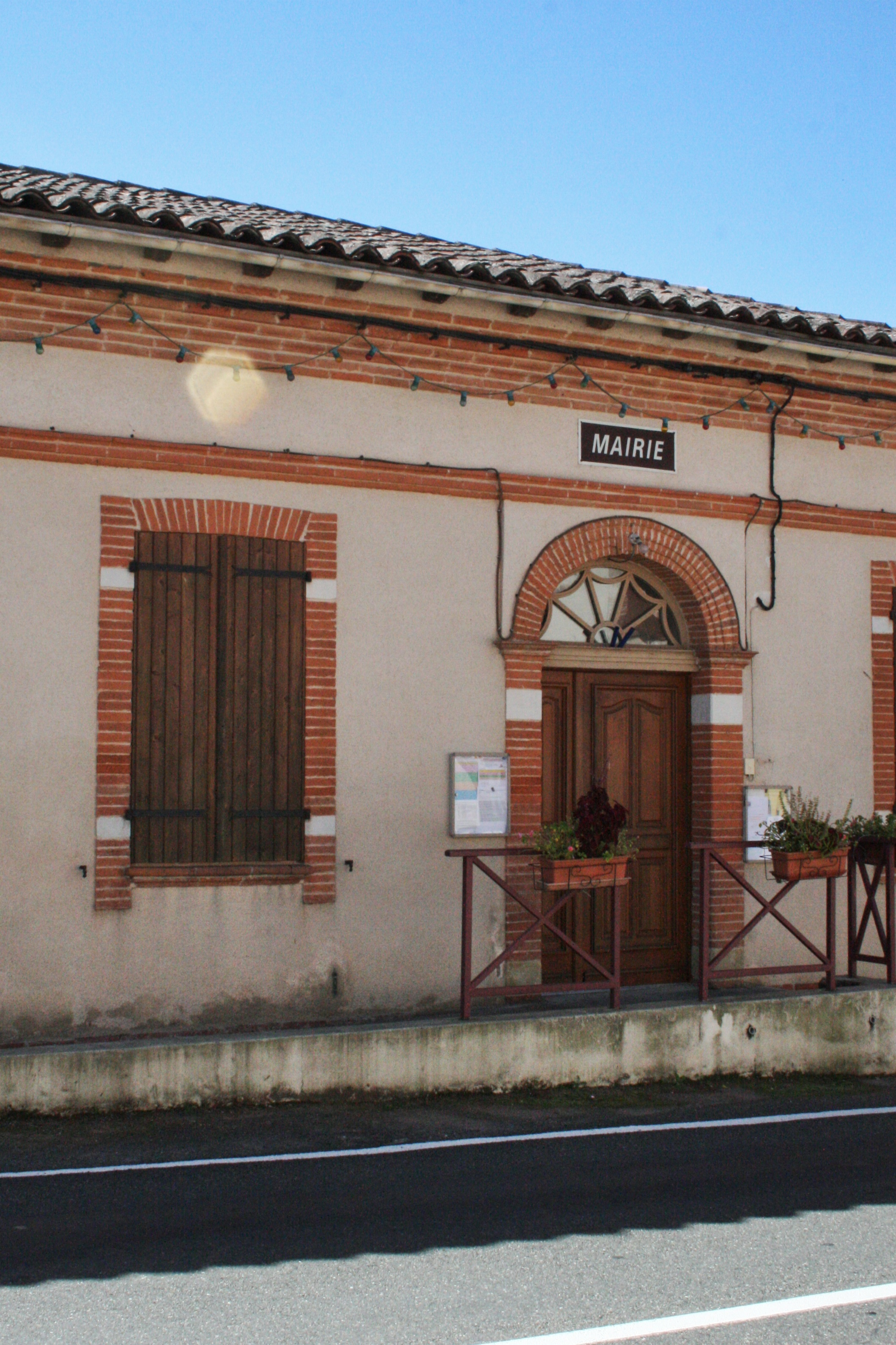 Mairie de la commune de Monblanc, dans le Gers